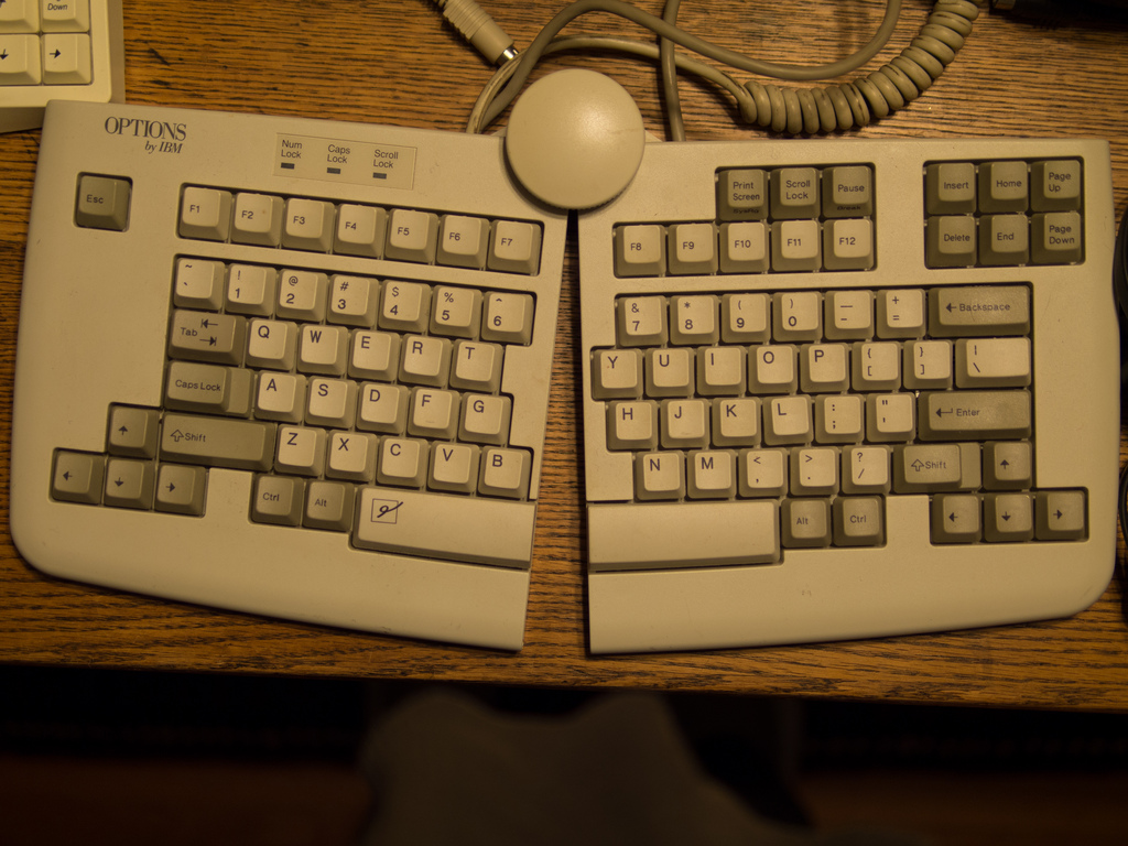 Tastiera Adjustable Keyboard con layout ANSI, prodotta da options by IBM.